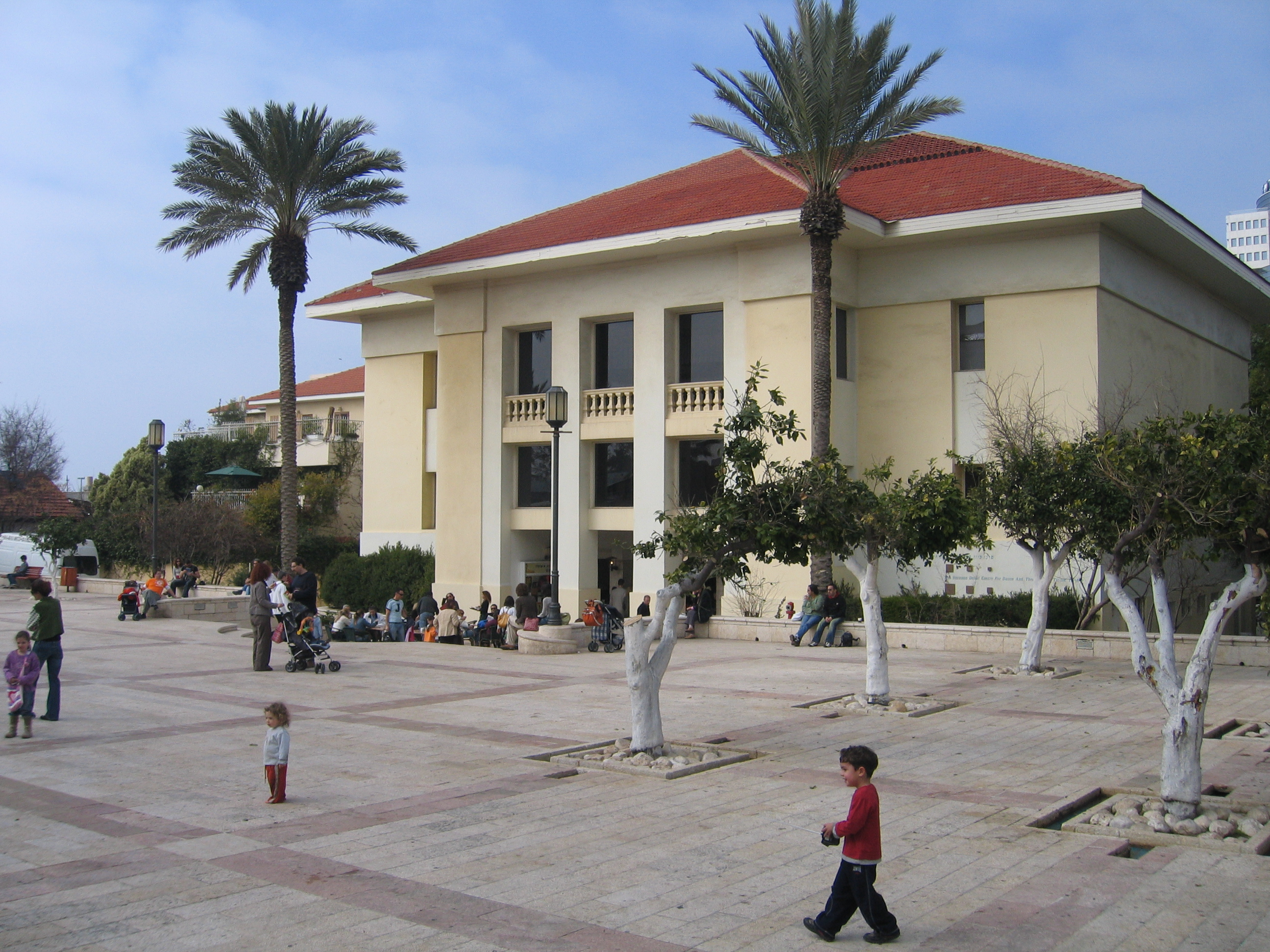 Talmoryair 13:26, 28 January 2007 (UTC)